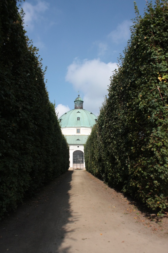 Živý plot , Kroměříž, Květná zahrada